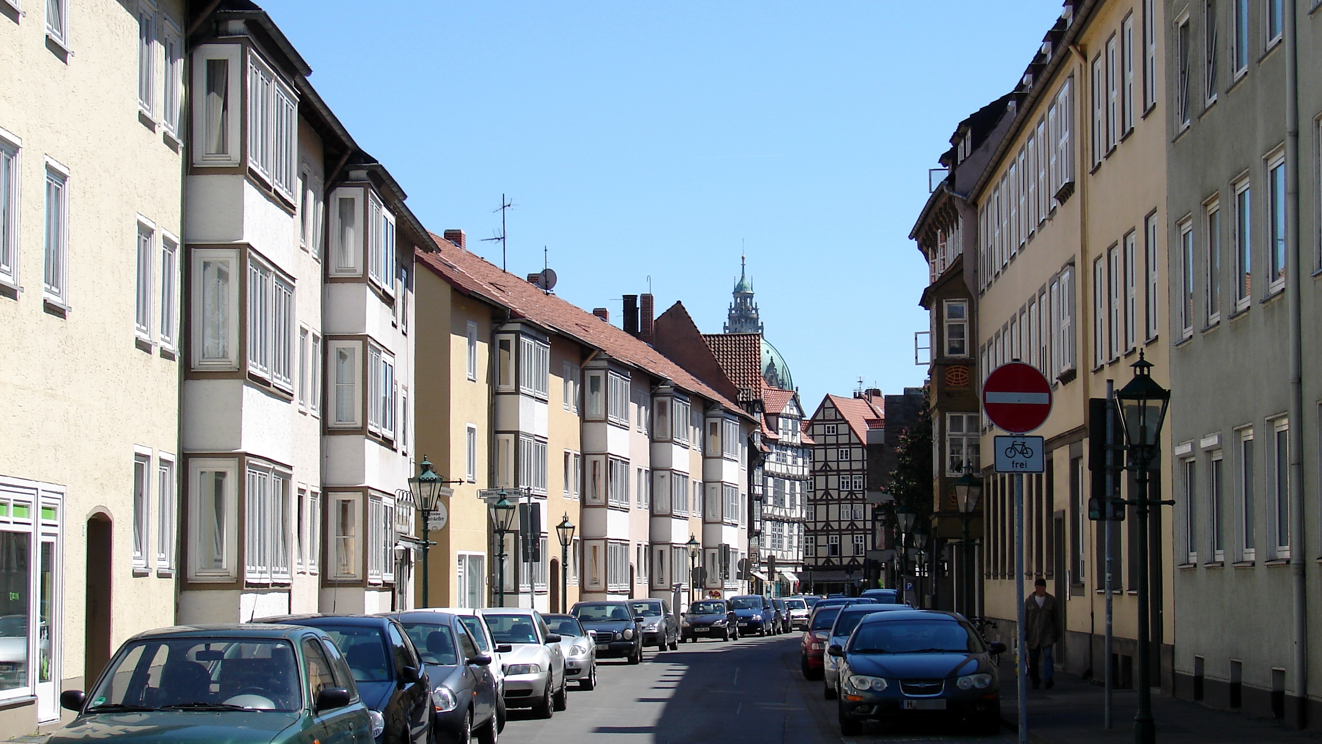 Die Burgstraße ist eine der ältesten Straßenzüge in Hannover, die im Kreuzkirchenviertel liegt. Sie war die nordwestliche Hauptstraße der Altstadt.